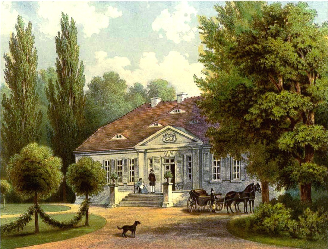 Rittergut Tolz, Kreis Saatzig, Provinz Pommern, Lithografie aus dem 19. Jahrhundert